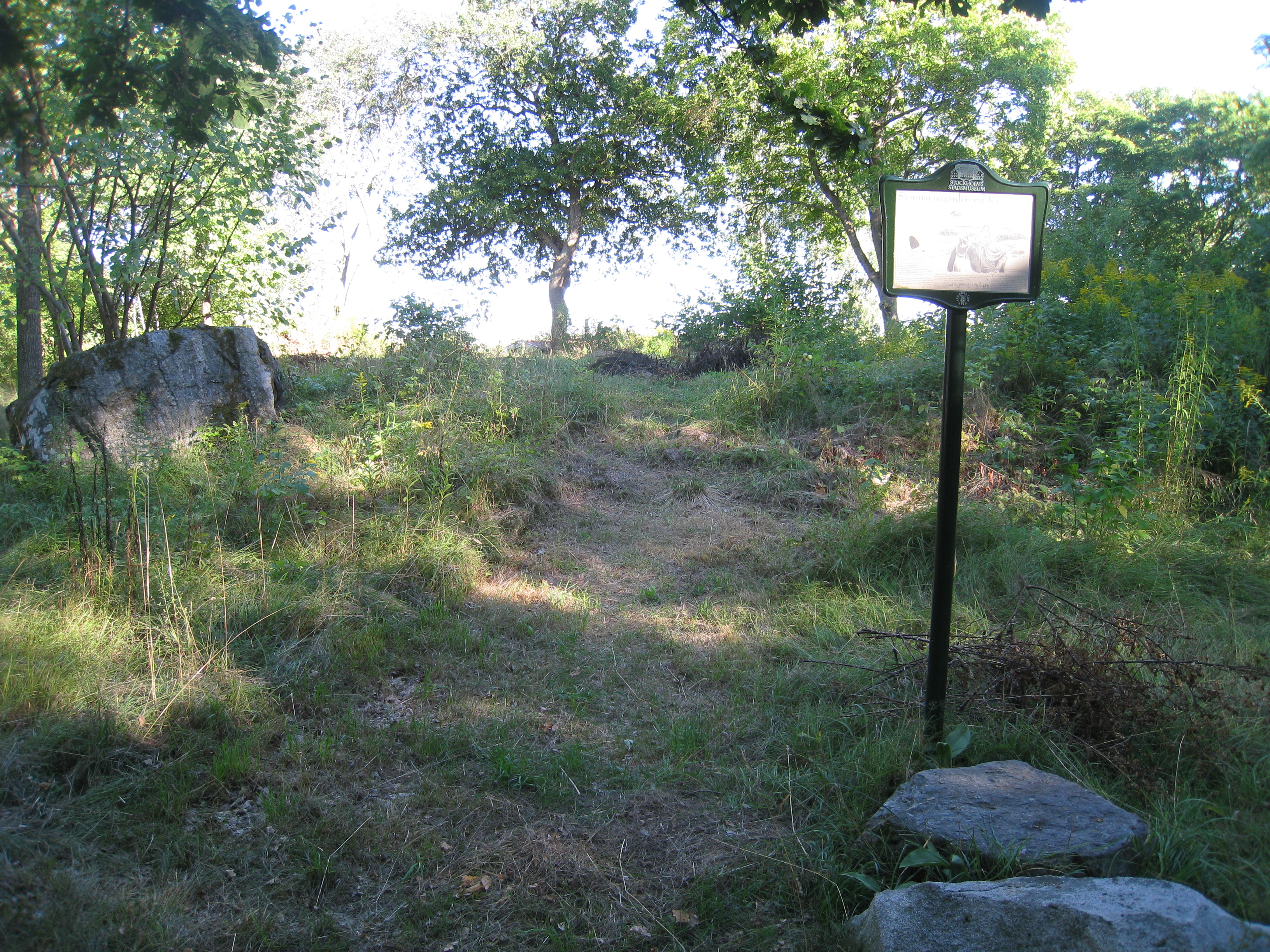 Stormannagården vid Karsvik (RAÄ226), ett platåhus från yngre järnåldern ca 800 e.Kr. - 1050 e.Kr. i Norra Ängby i Bromma. Fornlämningen ligger i ett skogsparti söder om Tacitusvägen och ovanför Östergården, som tillhörde Karsviks by.